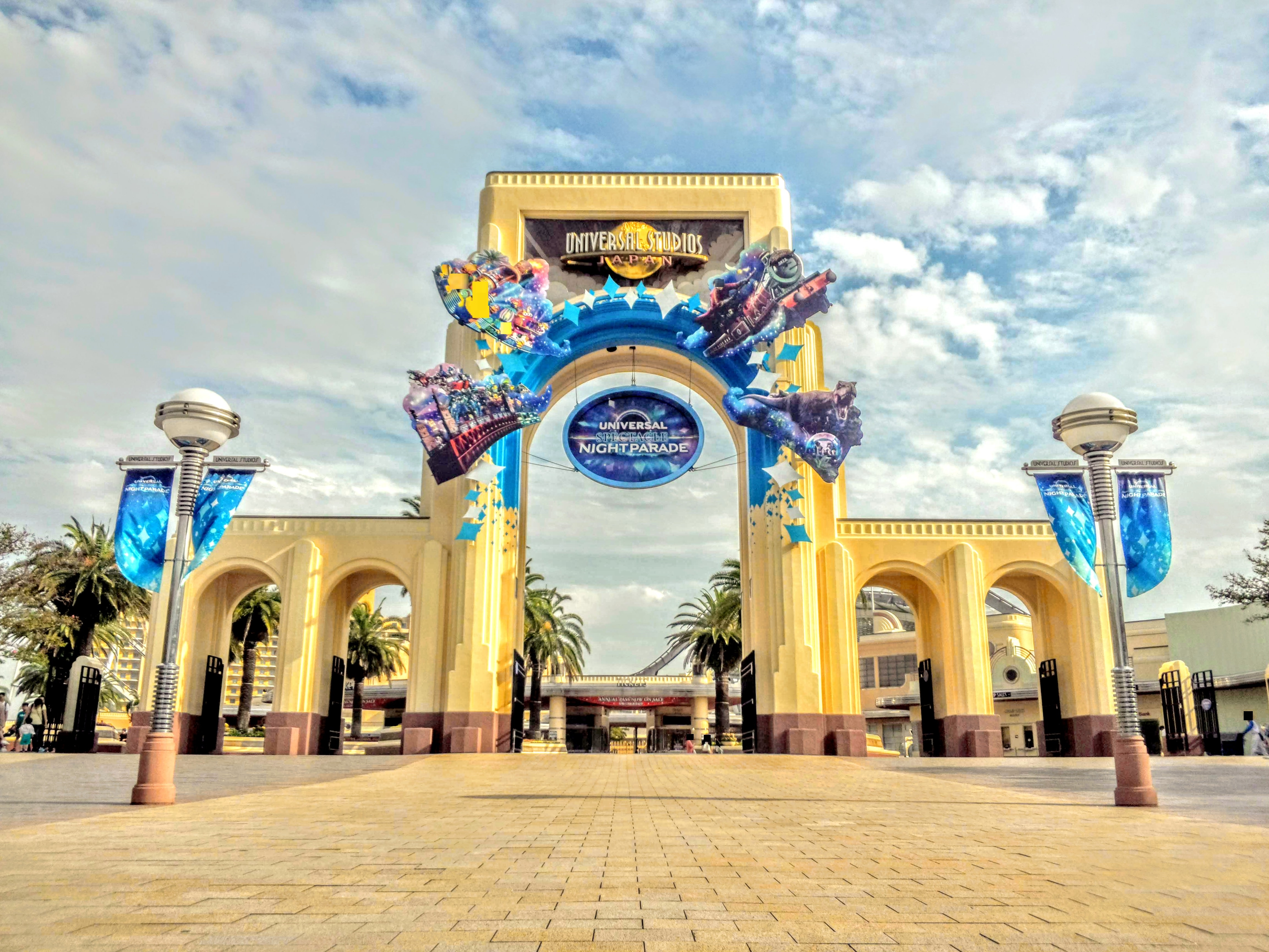 ユニバーサルスタジオジャパンの門